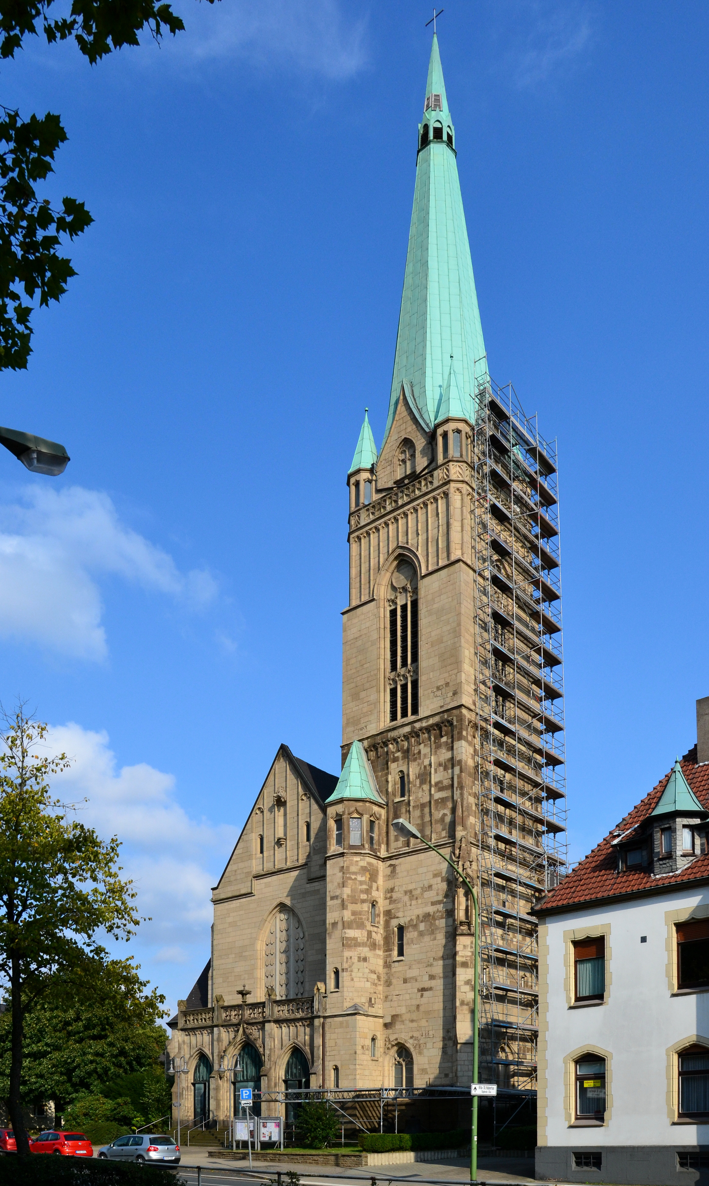 St. Hubertus-Kirche in Essen-Bergerhausen, unter DenkmalschutzThis is a photograph of an architectural monument., no. 104